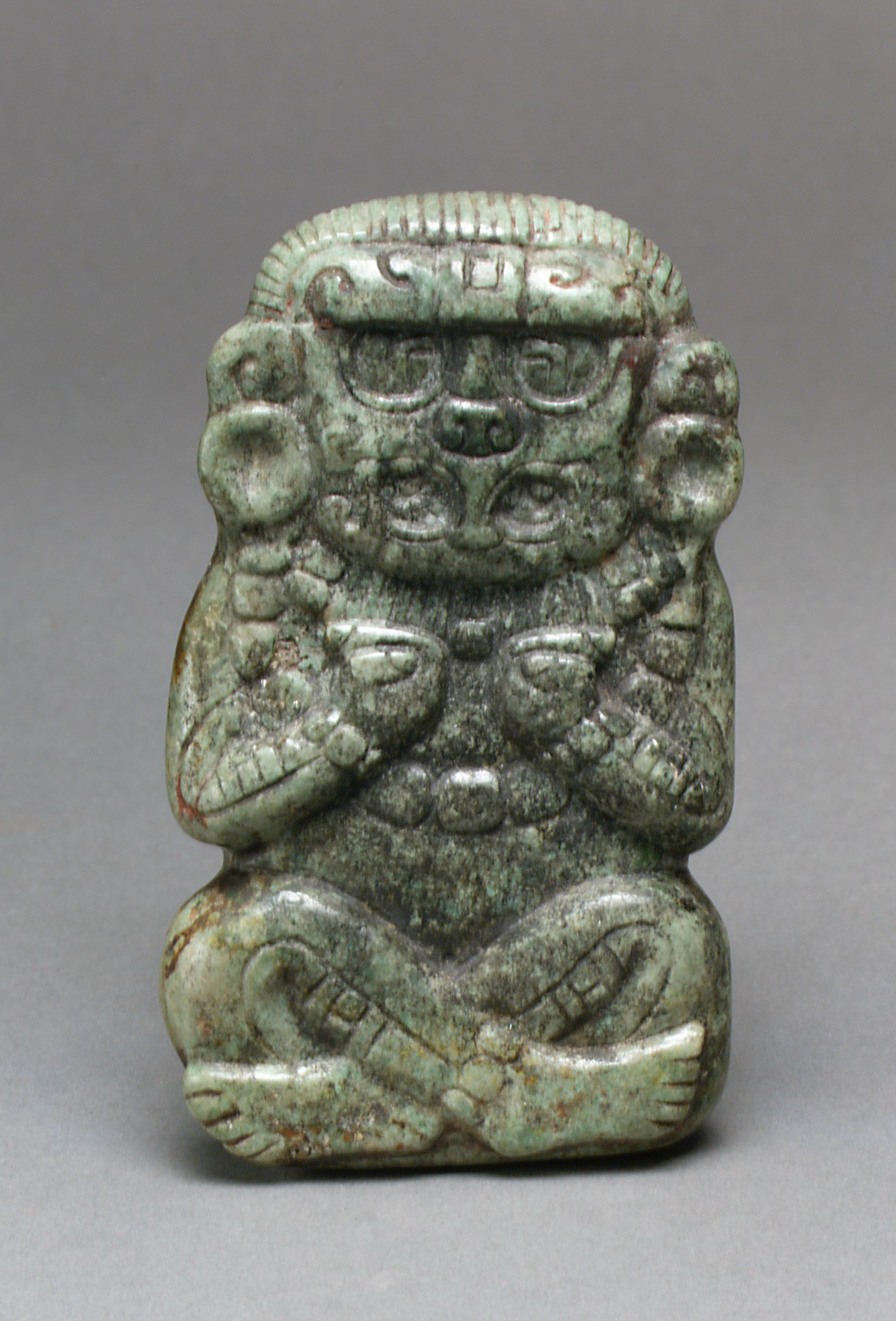 Maya; Figure; Stone-Sculpture